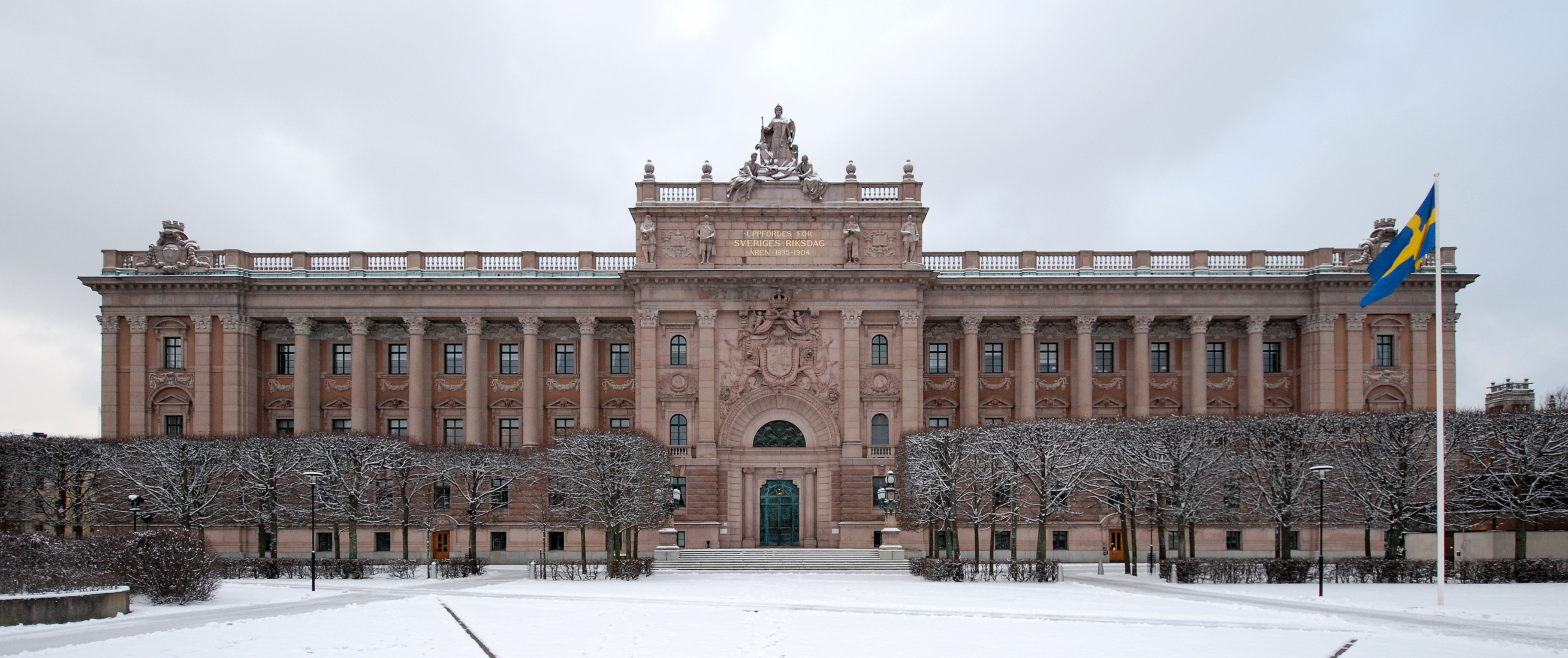 Riksdagshuset i Stockholm